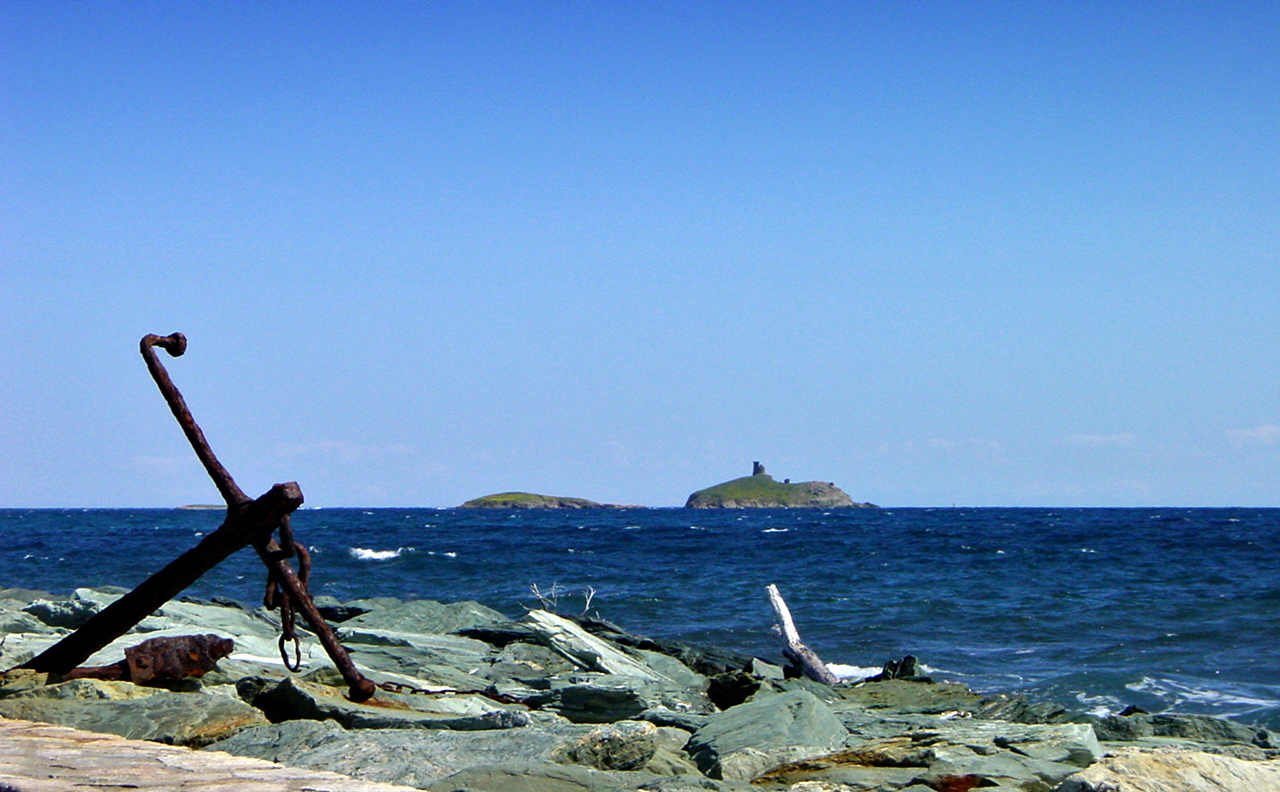 Rogliano (Corse) - Les îles Finocchiarola